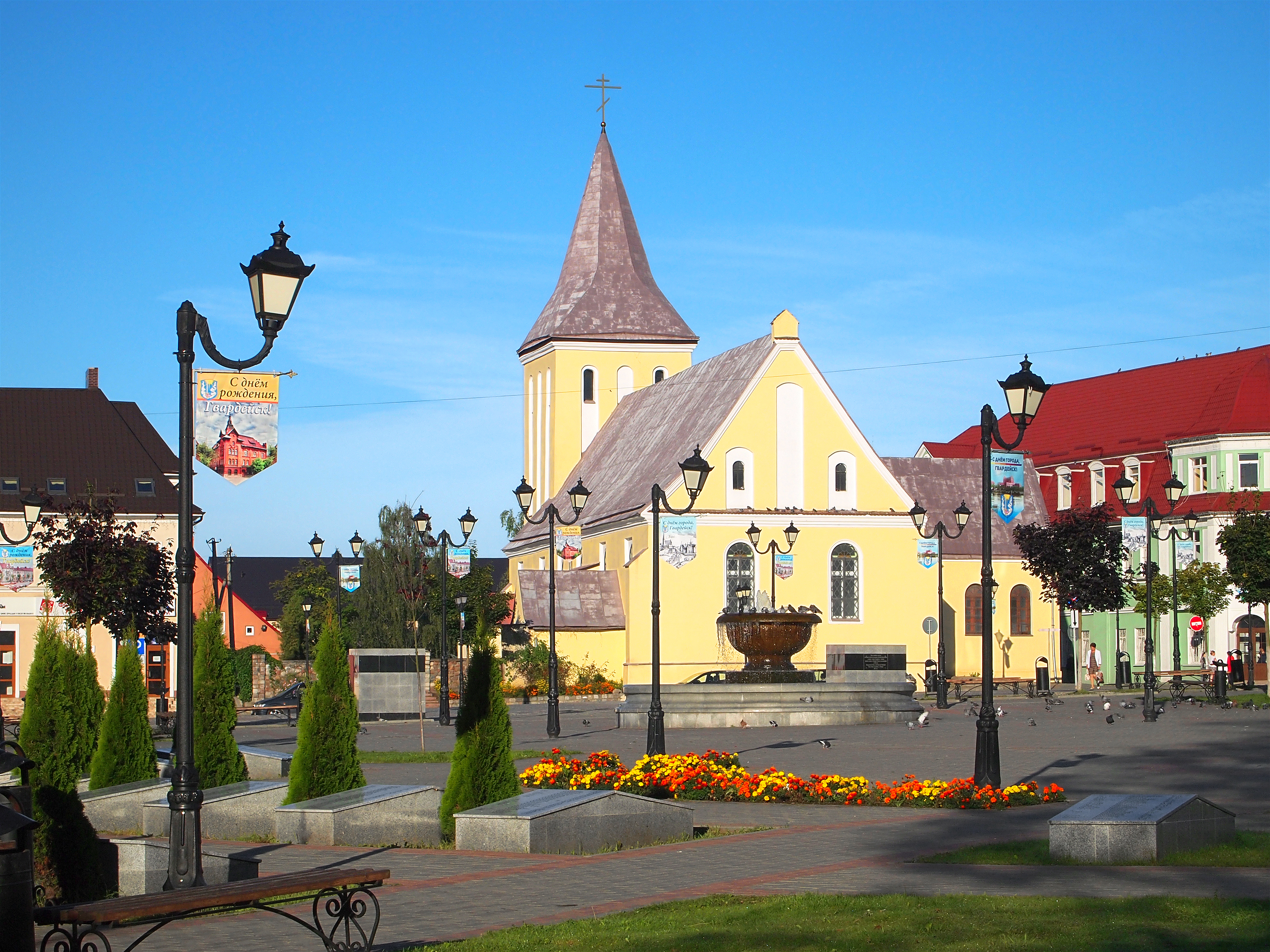 Приходская церковь (кирха): переулок Центральный, 1, Гвардейск, Гвардейский район, Калининградская область